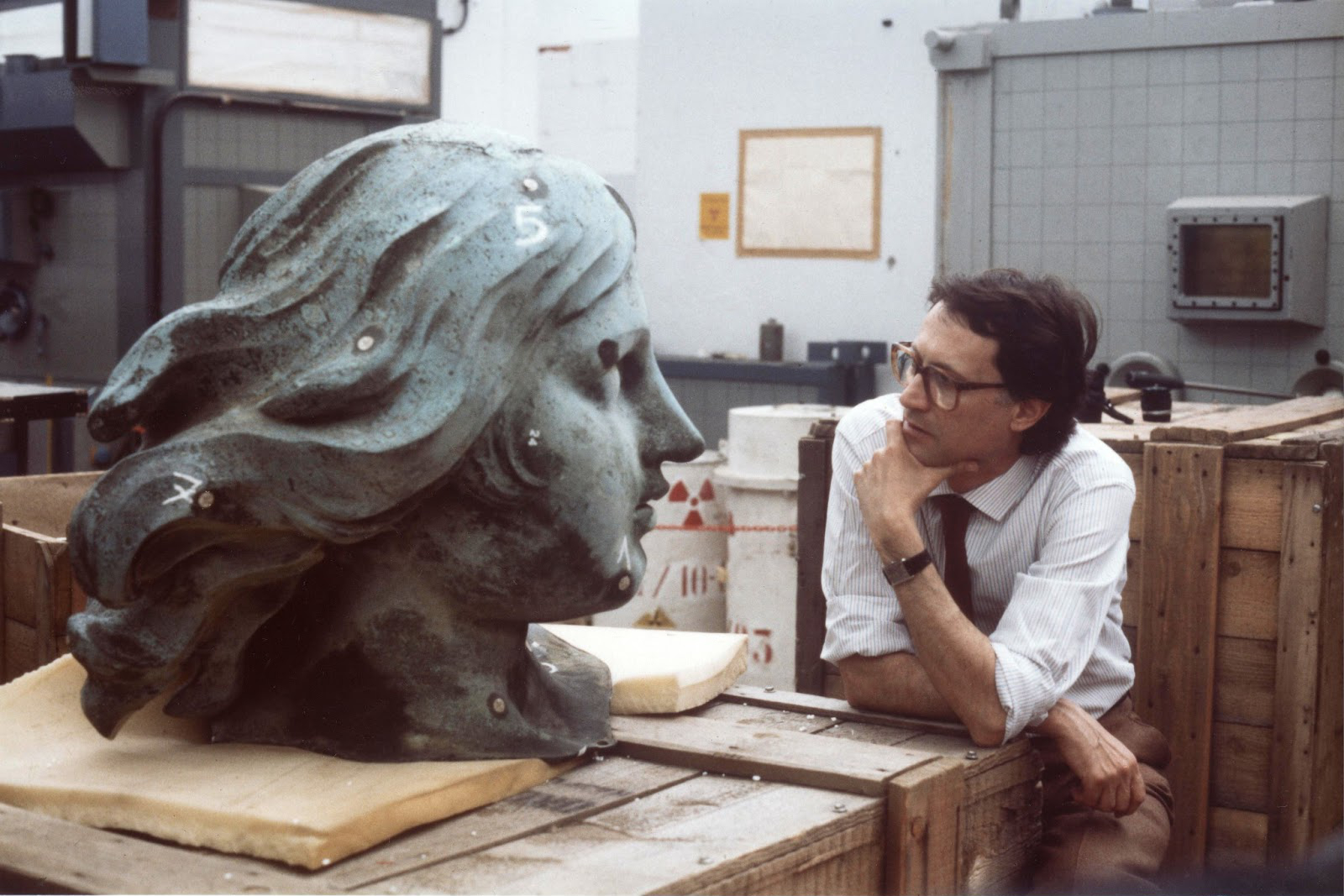 Geologo, fisico e pittore italiano